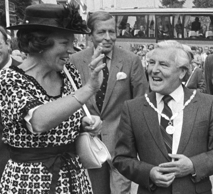 Koningin Beatrix, prins Claus en de burgemeester van Slenaken, F.L.H. Bogman, wandelen door het dorp te midden van vlaggende kinderen